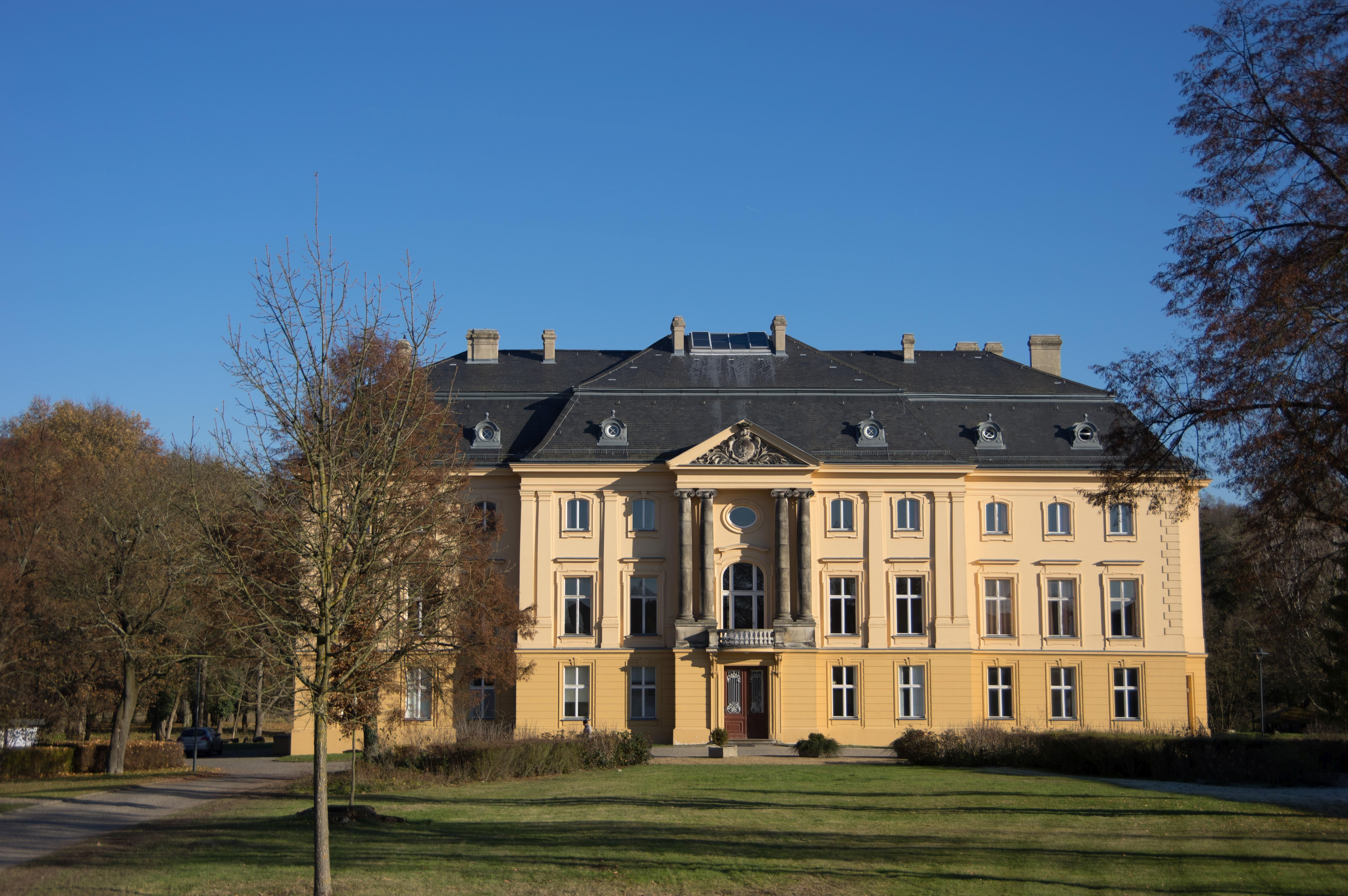 Müncheberg, Ortsteil Trebnitz in Brandenburg. Das Schloss steht unter Denkmalschutz.